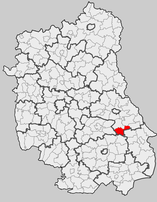 Map of gmina Wojsławice, Chełm county, Lublin voivodship Mapa gminy Wojsławice, powiat chełmski, województwo lubelskie